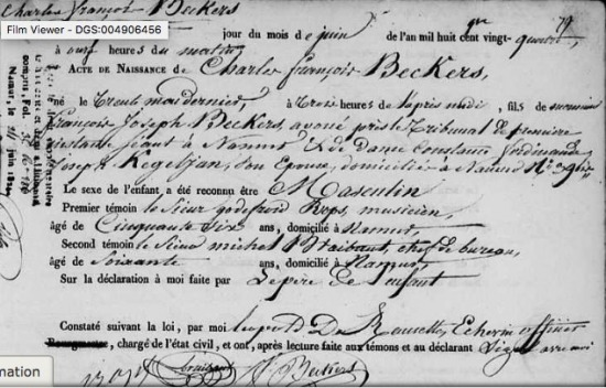 Acte d'état civil officiel de la ville de Namur, Belgique